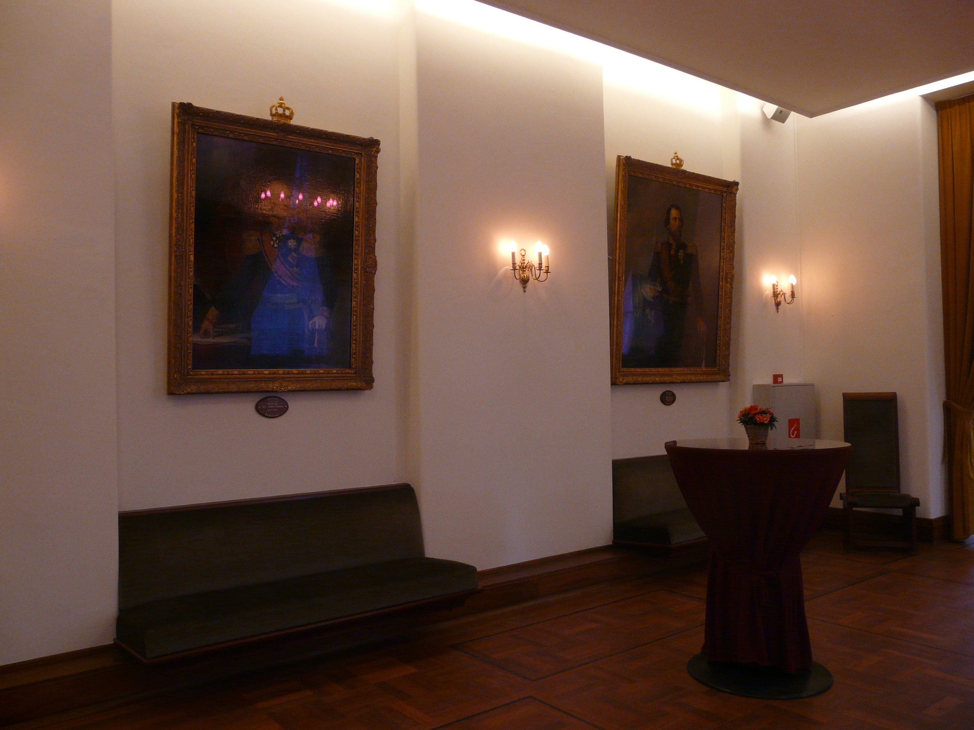 Nassauzaal in Kasteel van Breda in Breda Centrum in Breda